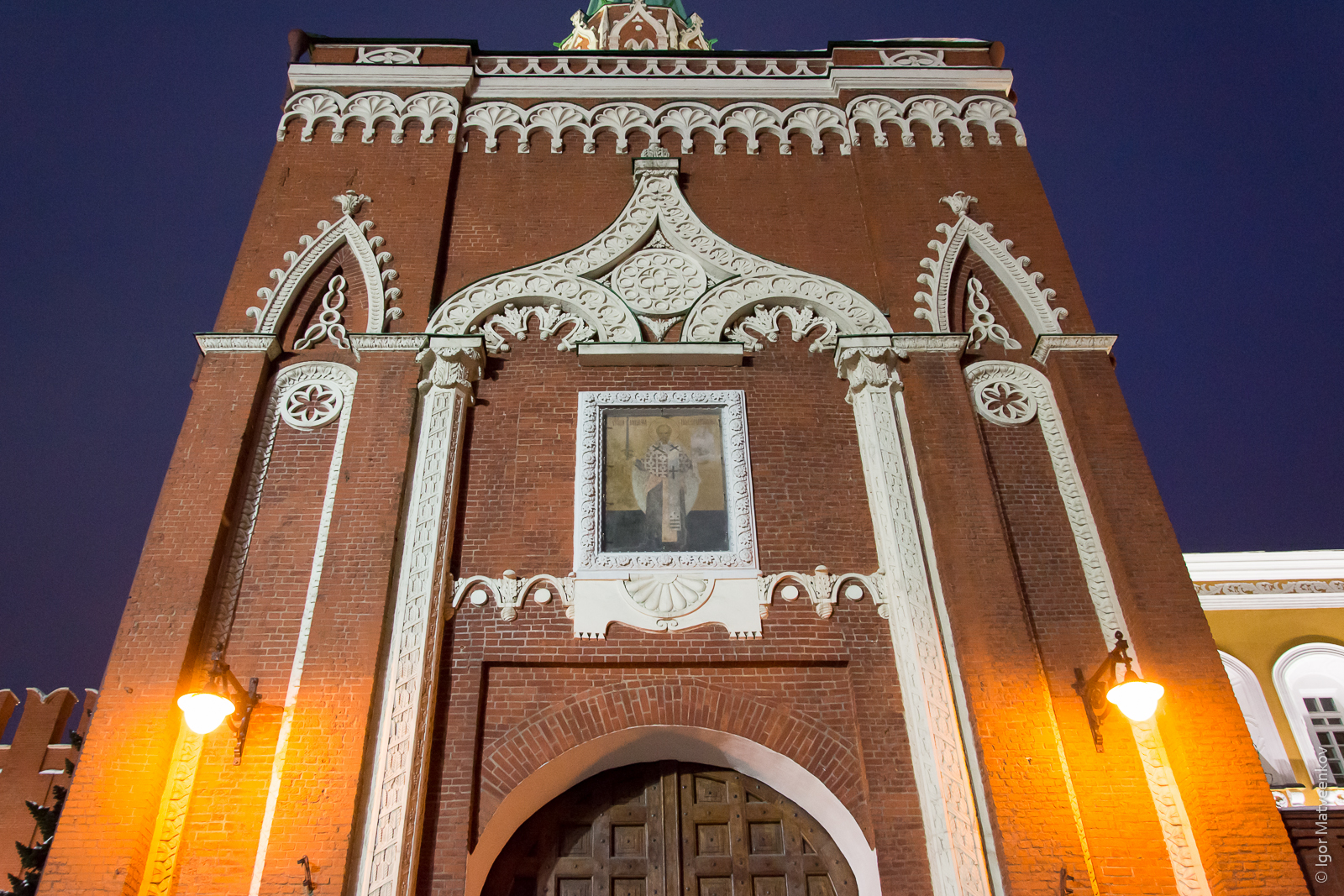 Kremlin